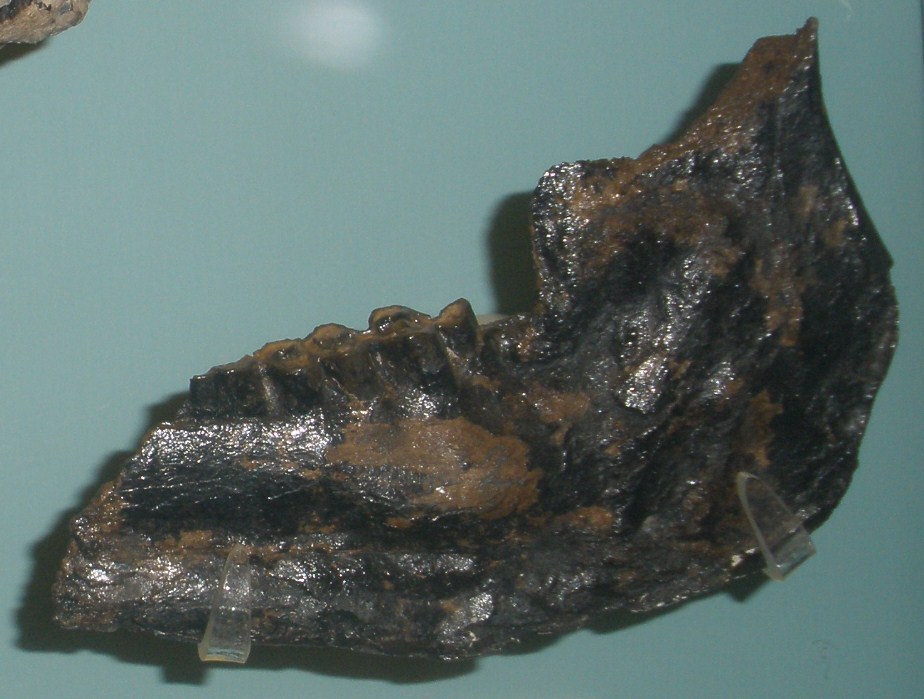 Fossil of MAremmia, an extinct mammal- Took the picture at Museo di Paleontologia di Firenze